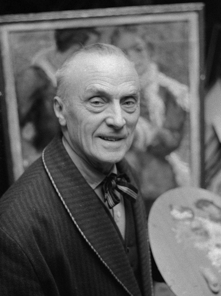 Gerard B. H. Westermann , bekend schilder hoopt 25 december a.s. 85 jaar te worden, Gerard Westermann in zijn atelier.